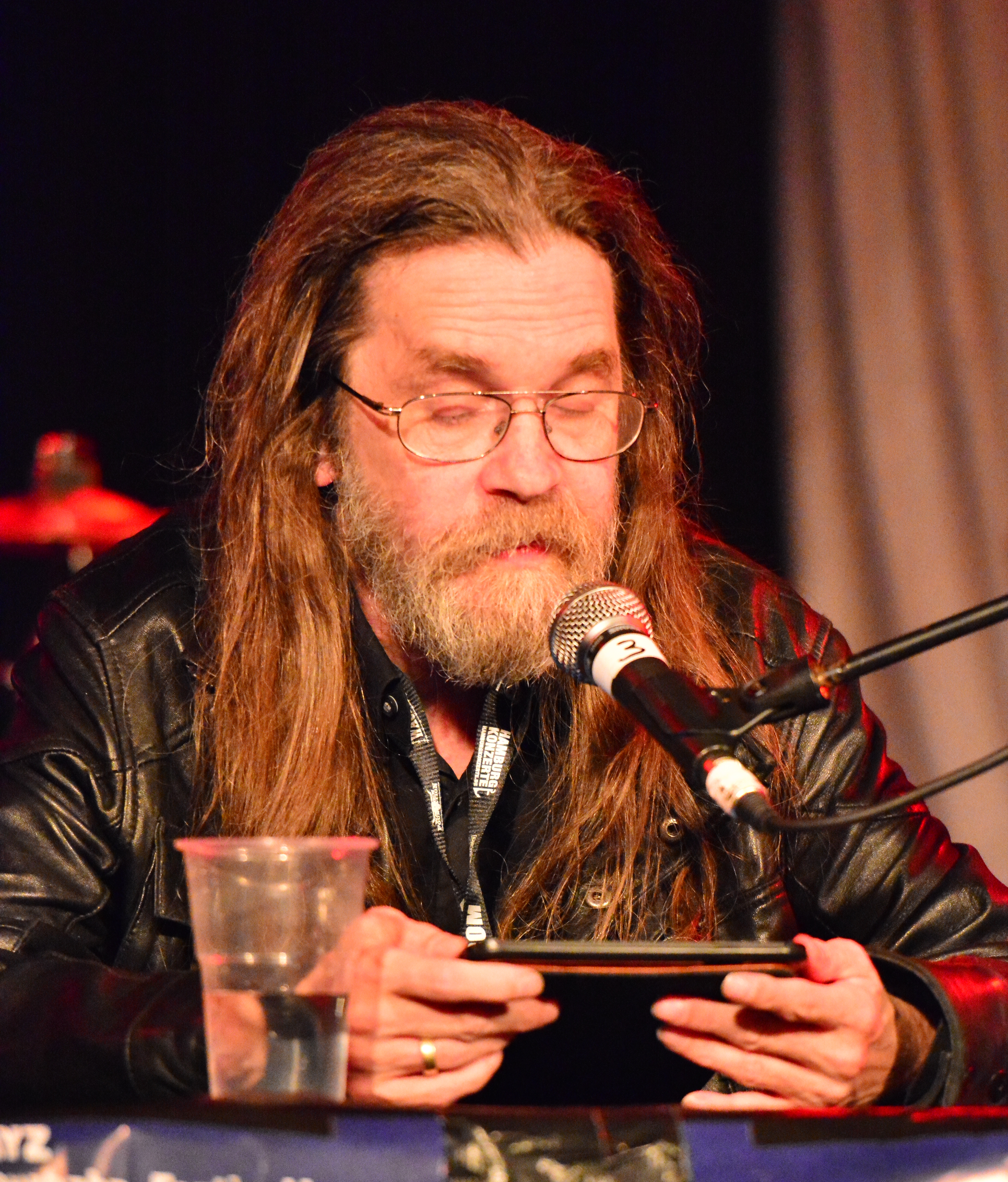 Der Buchautor Wolfgang Hohlbein bei einer Lesung bei den Hamburg Metal Dayz 2014